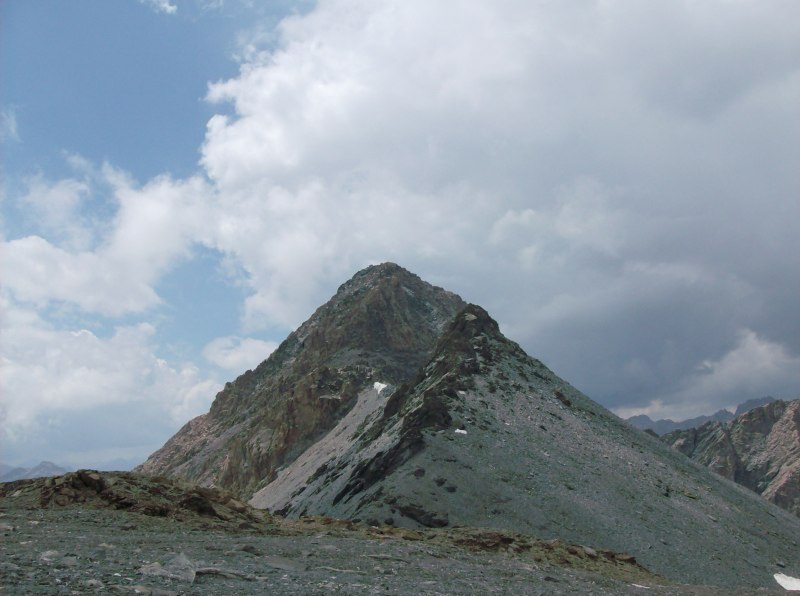 Il Monte Mongioia visto dalla cresta sopra il Passo Salza